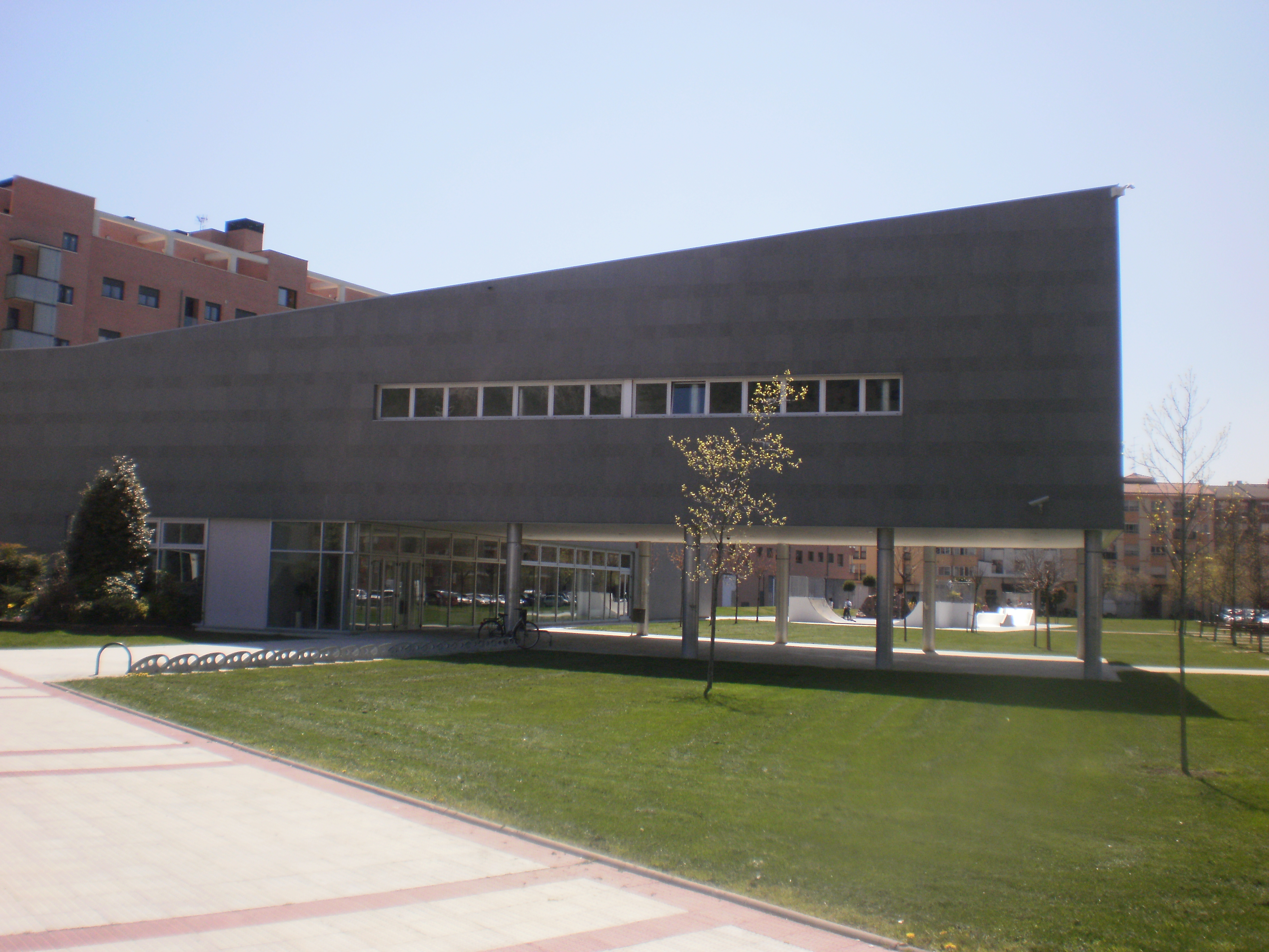 Casa de la Juventud de Ansoáin (Navarra-España)